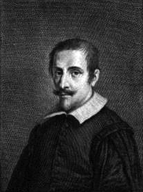 Portrait du peintre BALDASSARE ALOISI dit IL GALANINO